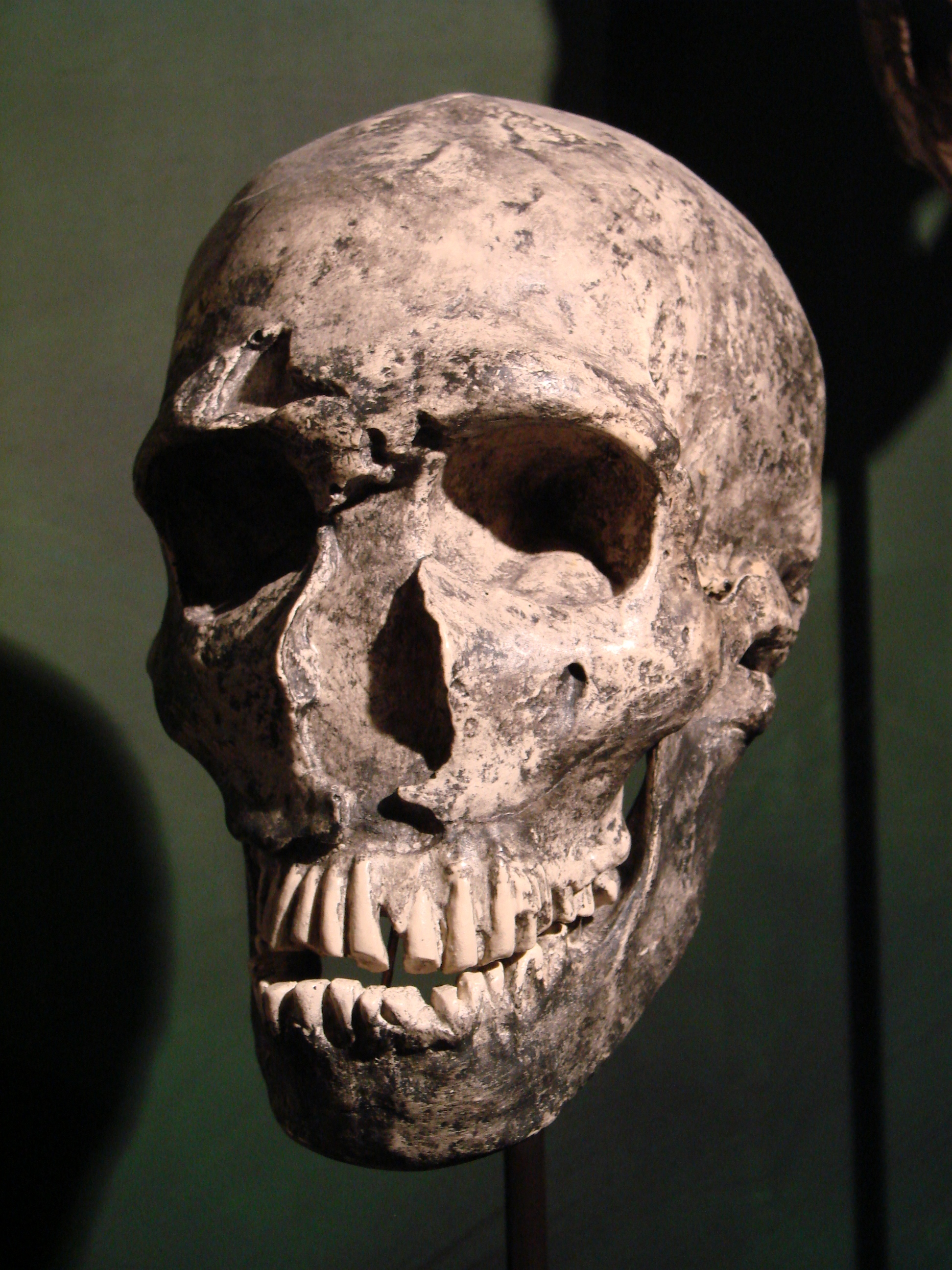 Muséum d'Anthropologie, campus universitaire d'Irchel, Université de Zurich (Suisse) : Homo neanderthalensis (La Ferrassie, France)